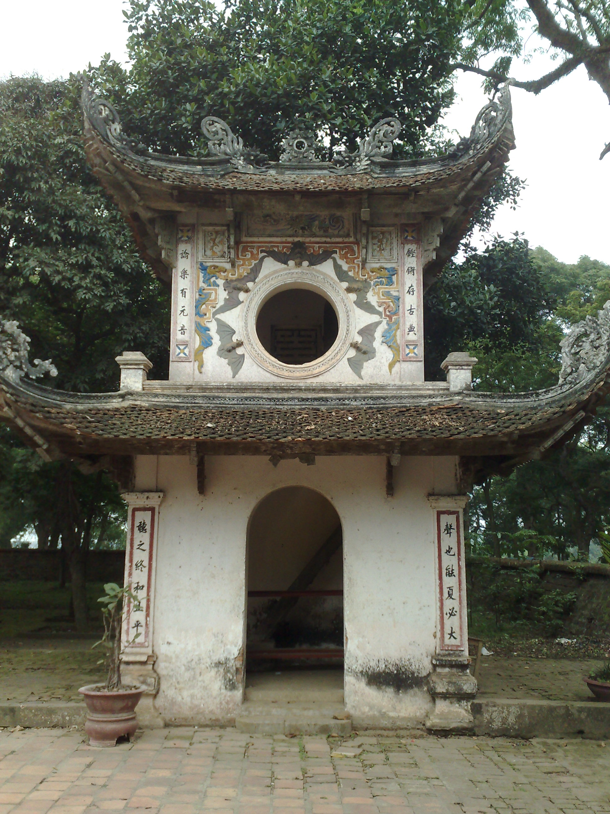 Gác chuông đền và (Thị xã Sơn Tây, hà Tây) do tôi tự chụp và tải lên để minh hoạ cho bài viết Đền Và.